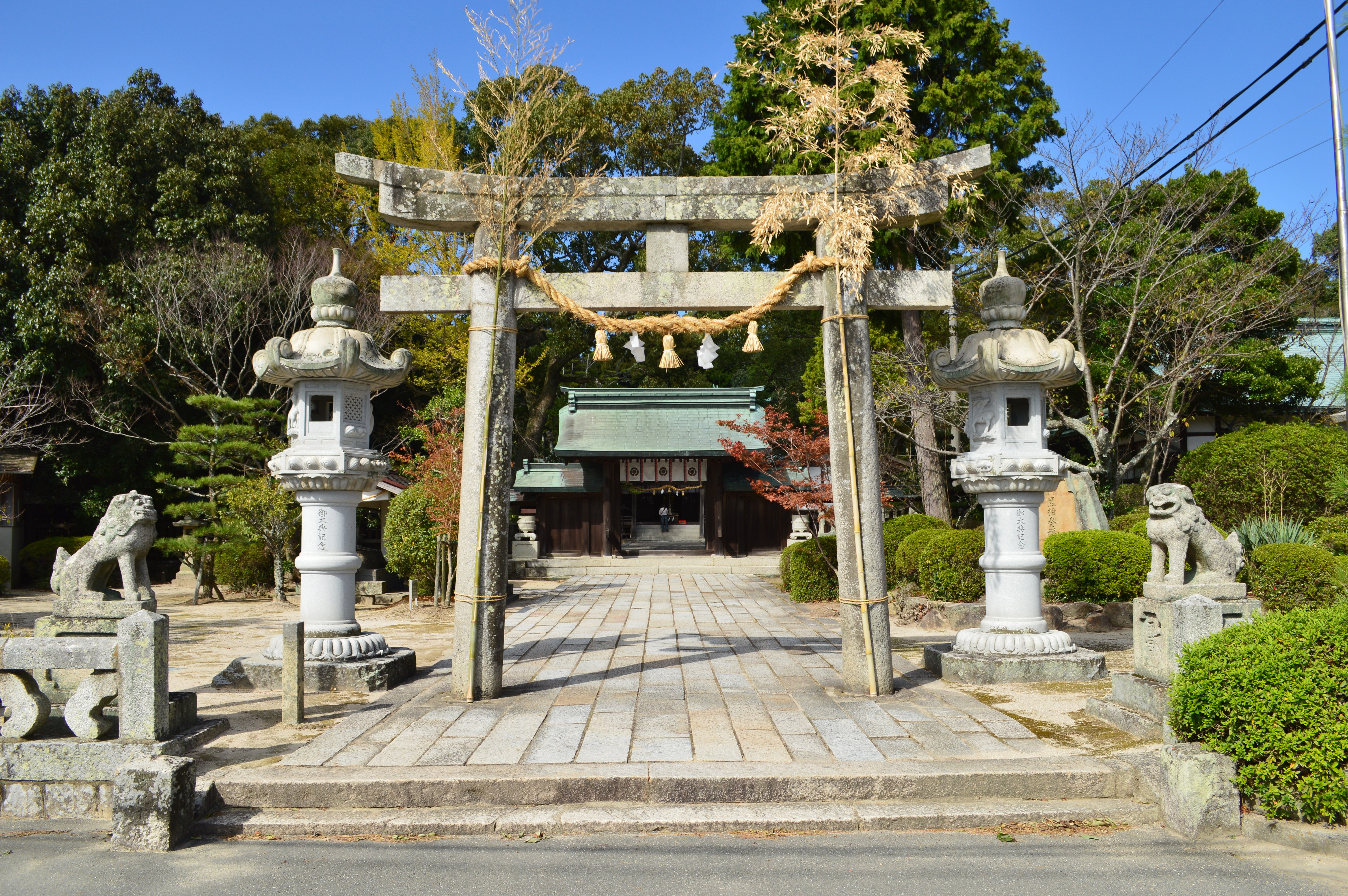 玉祖神社 (防府市) 境内鳥居